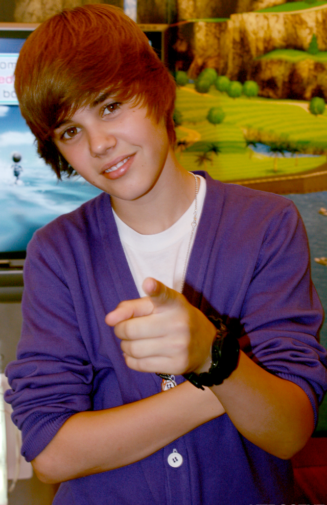 Justin Bieber, NYC signing September 1,2009 Nintendo Store - NYC